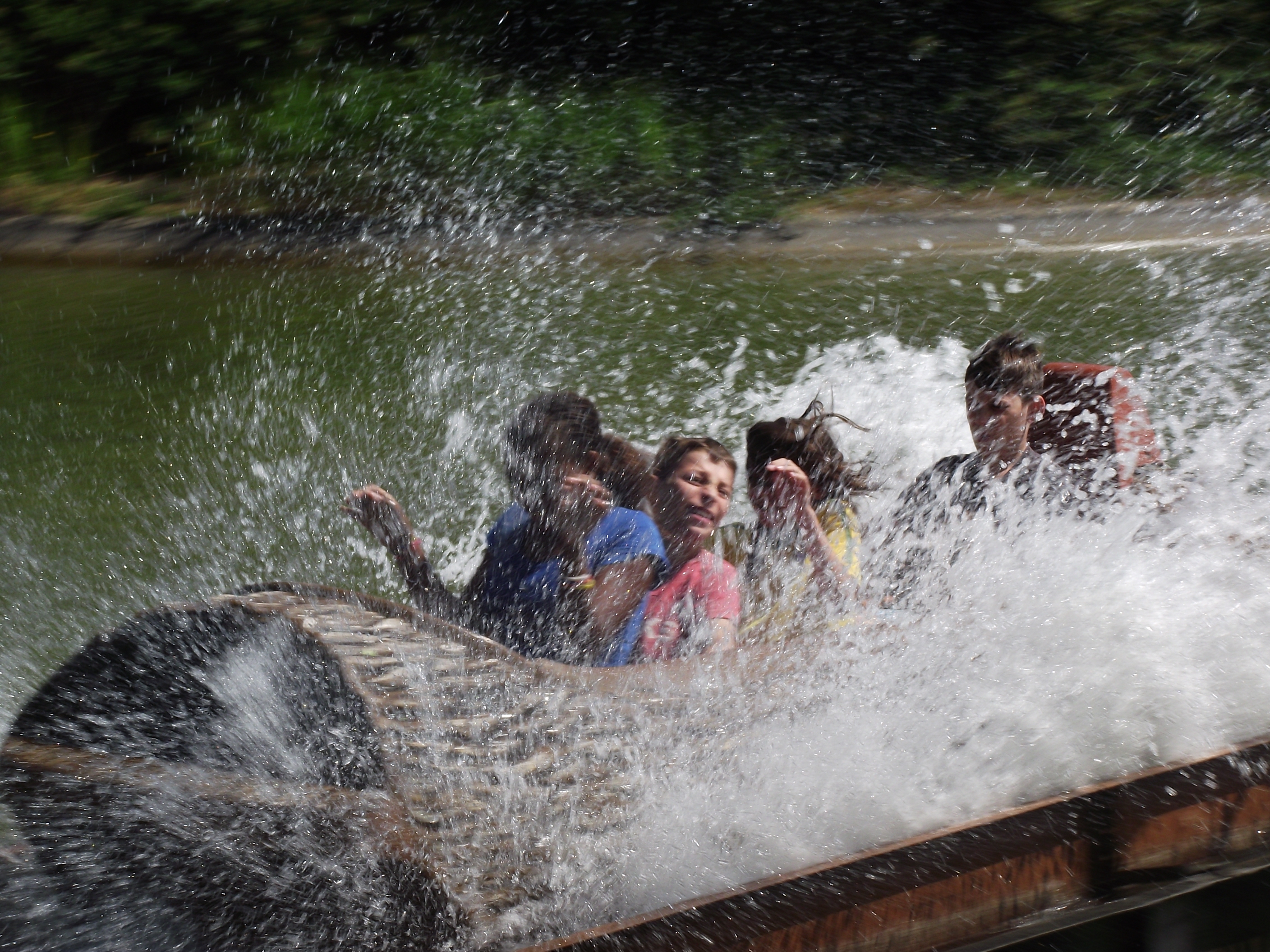 Drakkar Walibi Sud-Ouest